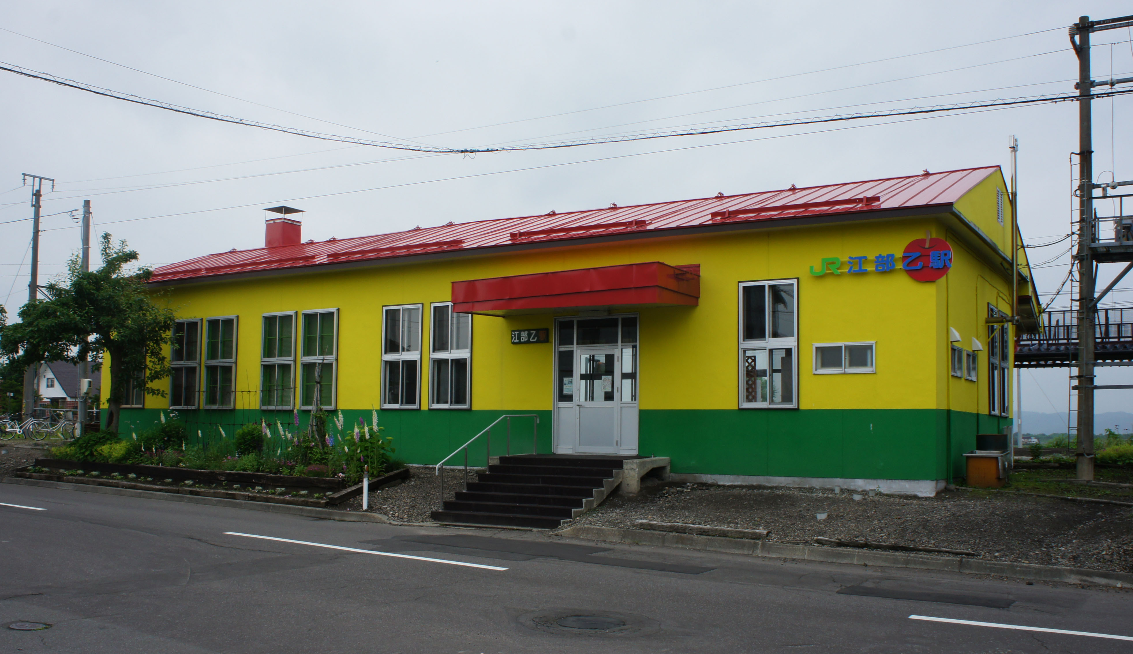 JR函館本線・江部乙駅の駅舎 Sony NEX-3